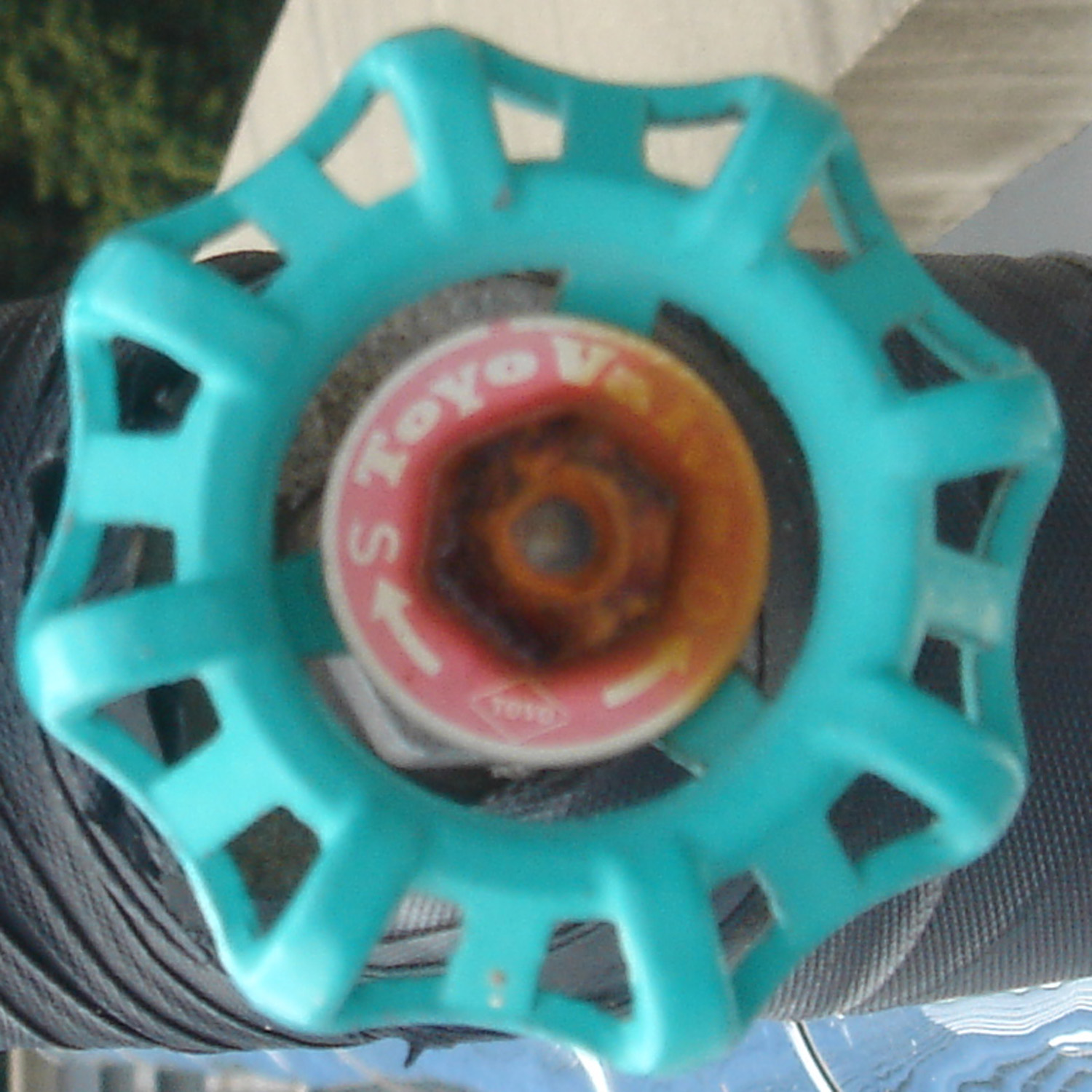 Valve Handle